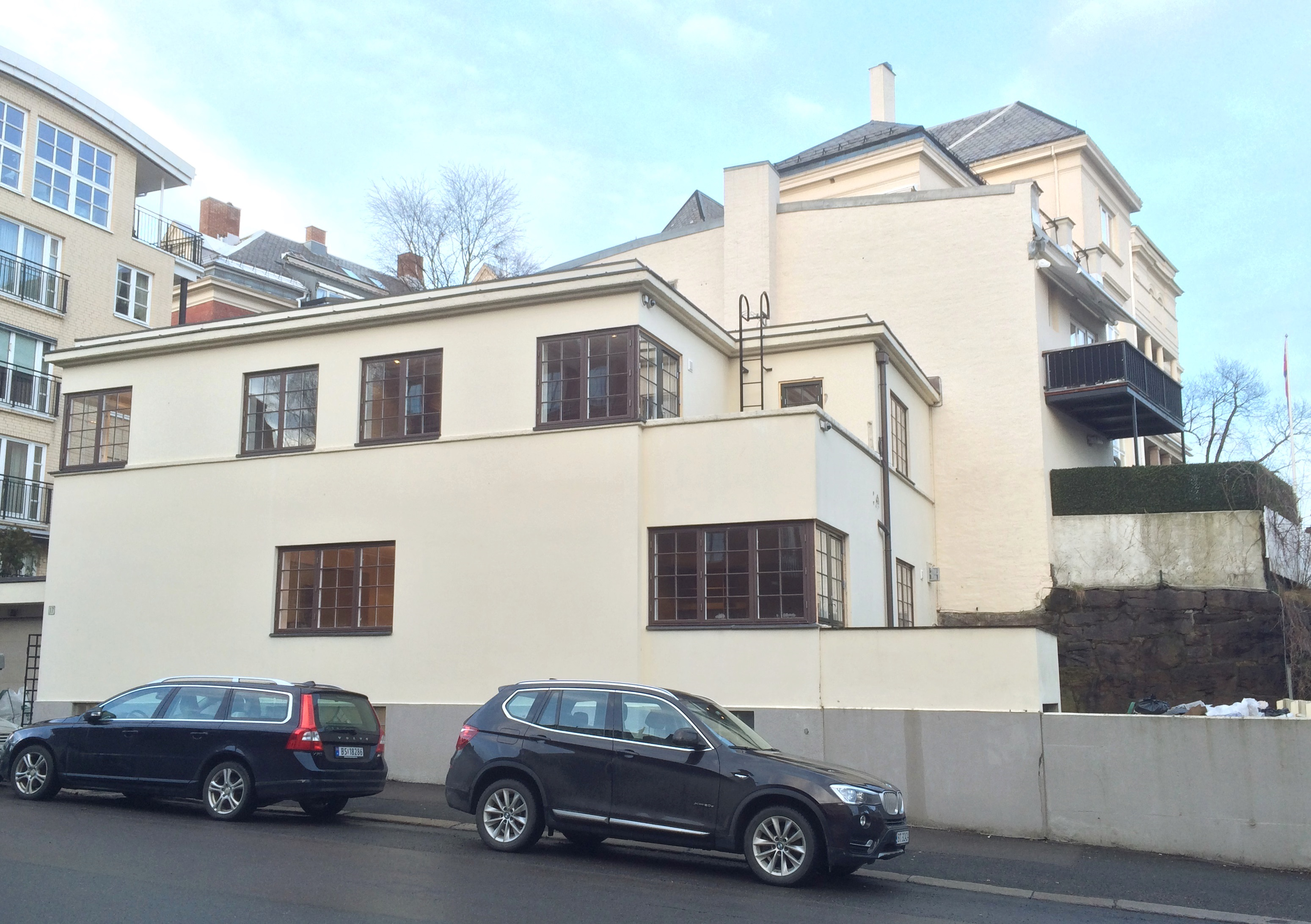 Gabels gate 17 (arkitekt: Ulf Berbom, 1931) foran Niels Juels gate 14B